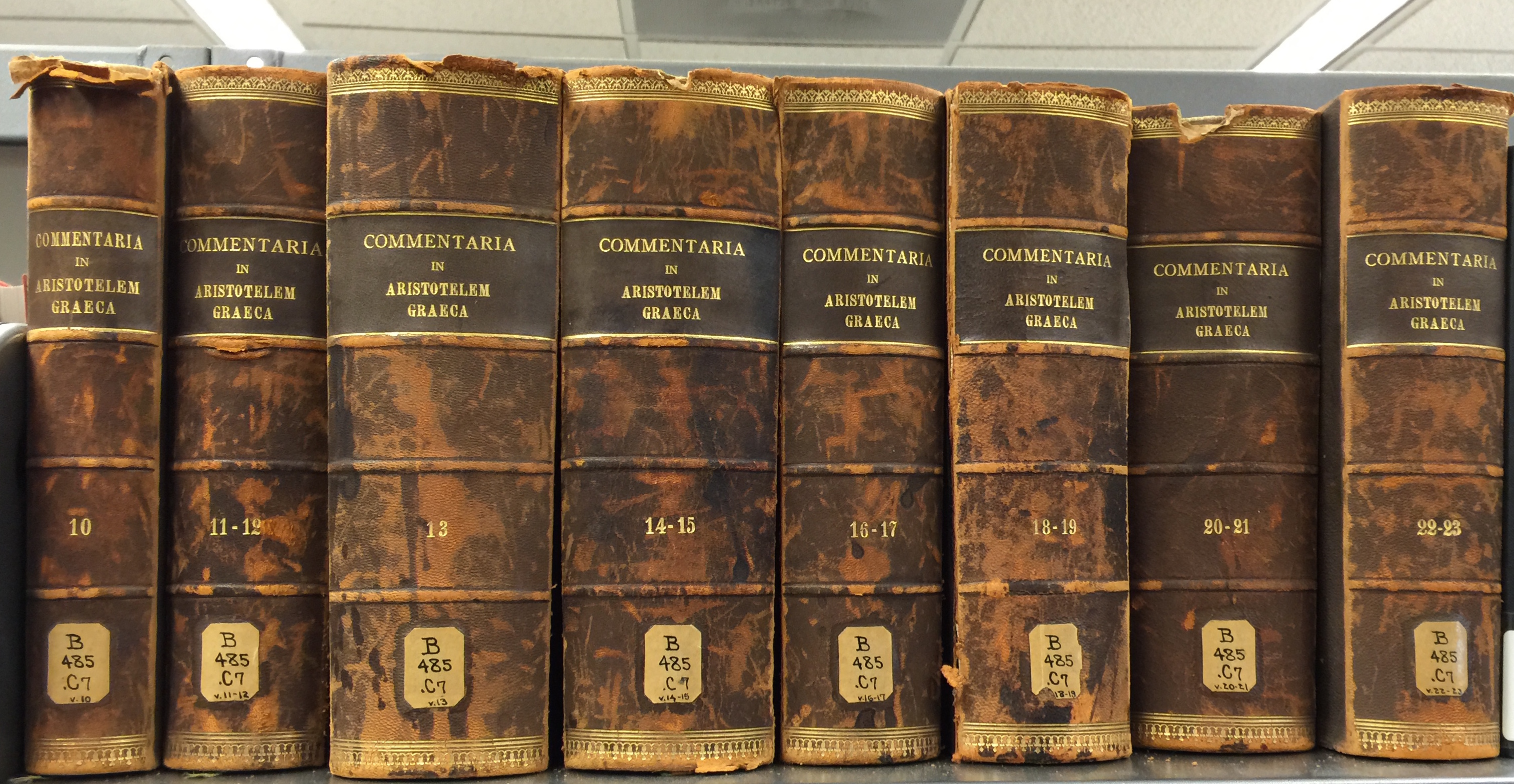 Une partie des volumes des Commentaires grecs sur les livres d'Aristote. Publiée à Berlin par la Deutsche Akademie der Wissenschaften (1882-1909)